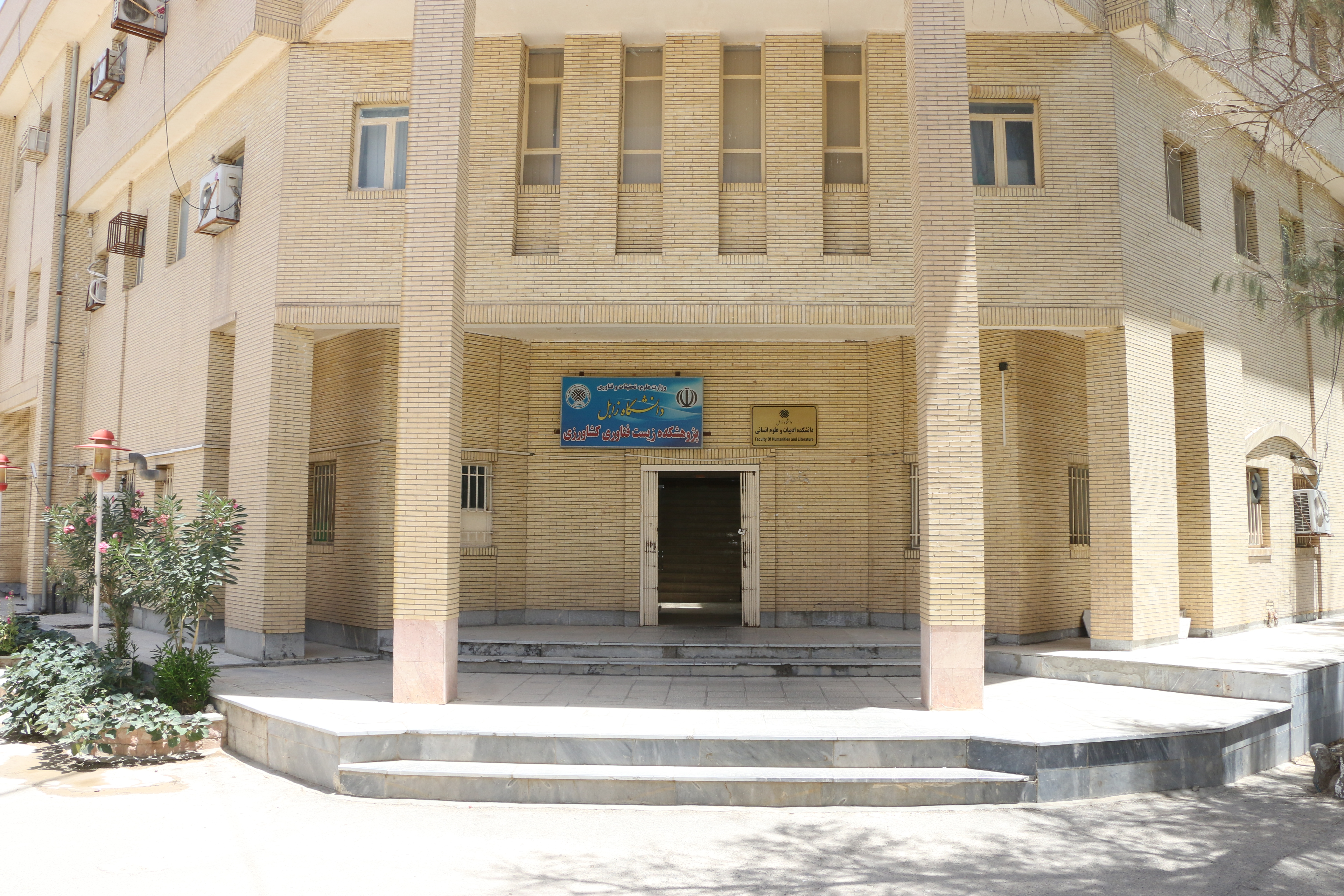 نمای دانشکده ادبیات